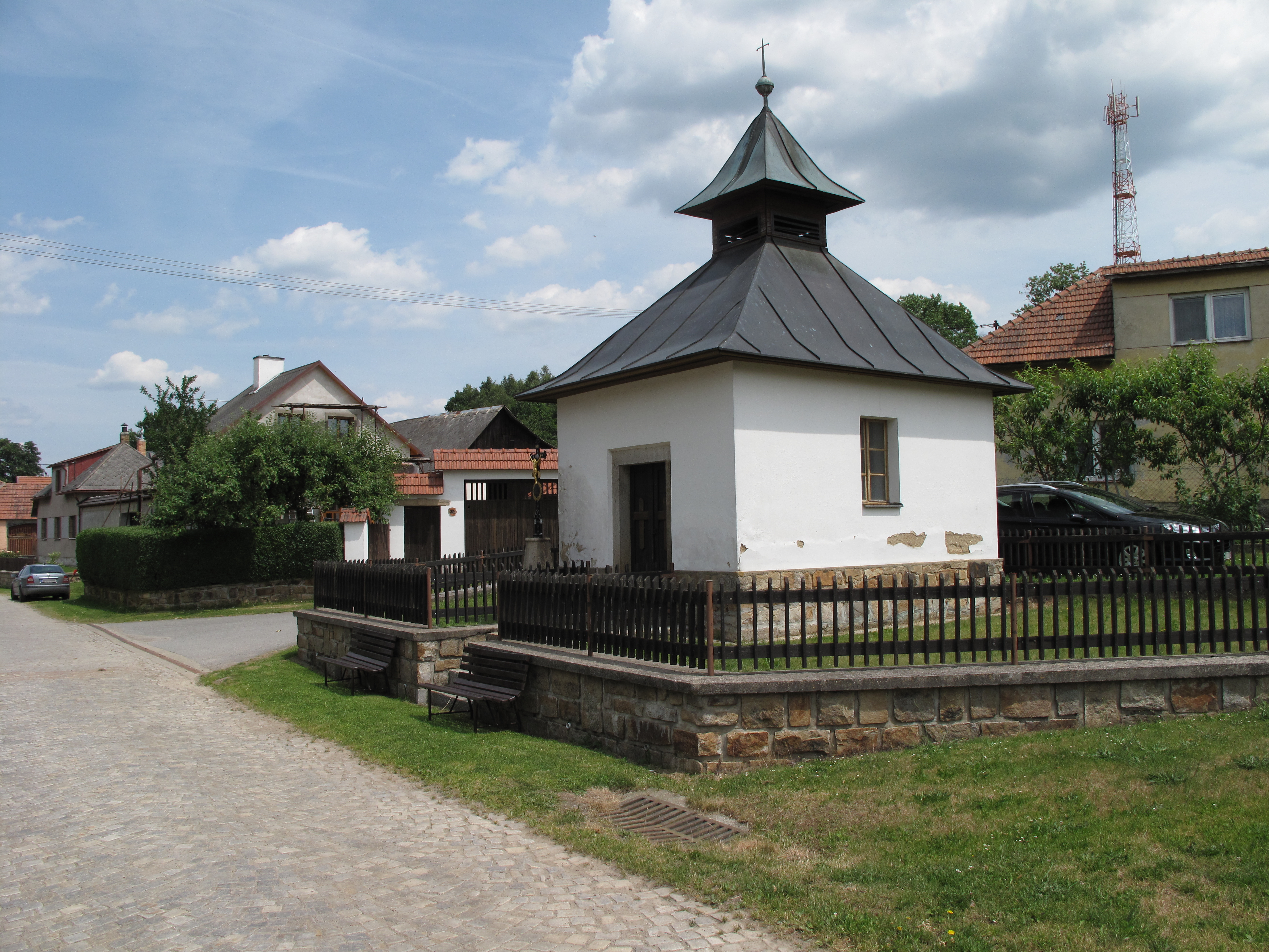 Kaplička v Jankově. Okres Pelhřimov, Česká republika.